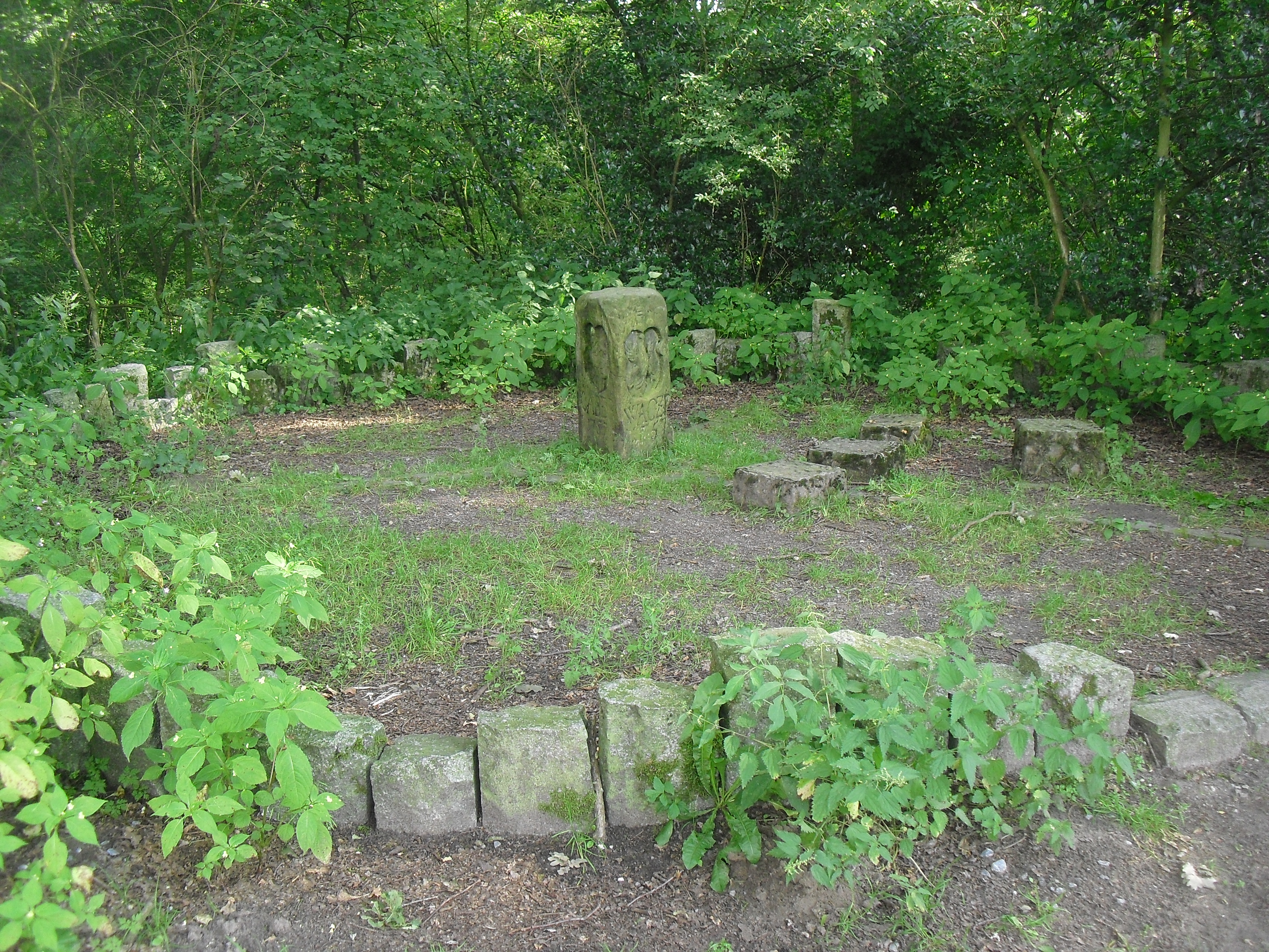 Freier Stuhl zwischen Lipperode, Westenholz und Mastholte Grenzstein Nr. 1 von 1757 zwischen Westenholz (Fürstbistum Paderborn) und Mastholte (Grafschaft Rietberg) Grenstein Nr. 12 von 1833 zwischen Preußen und Lipperode (Fürstentum Lippe) This is a photograph of an architectural monument.